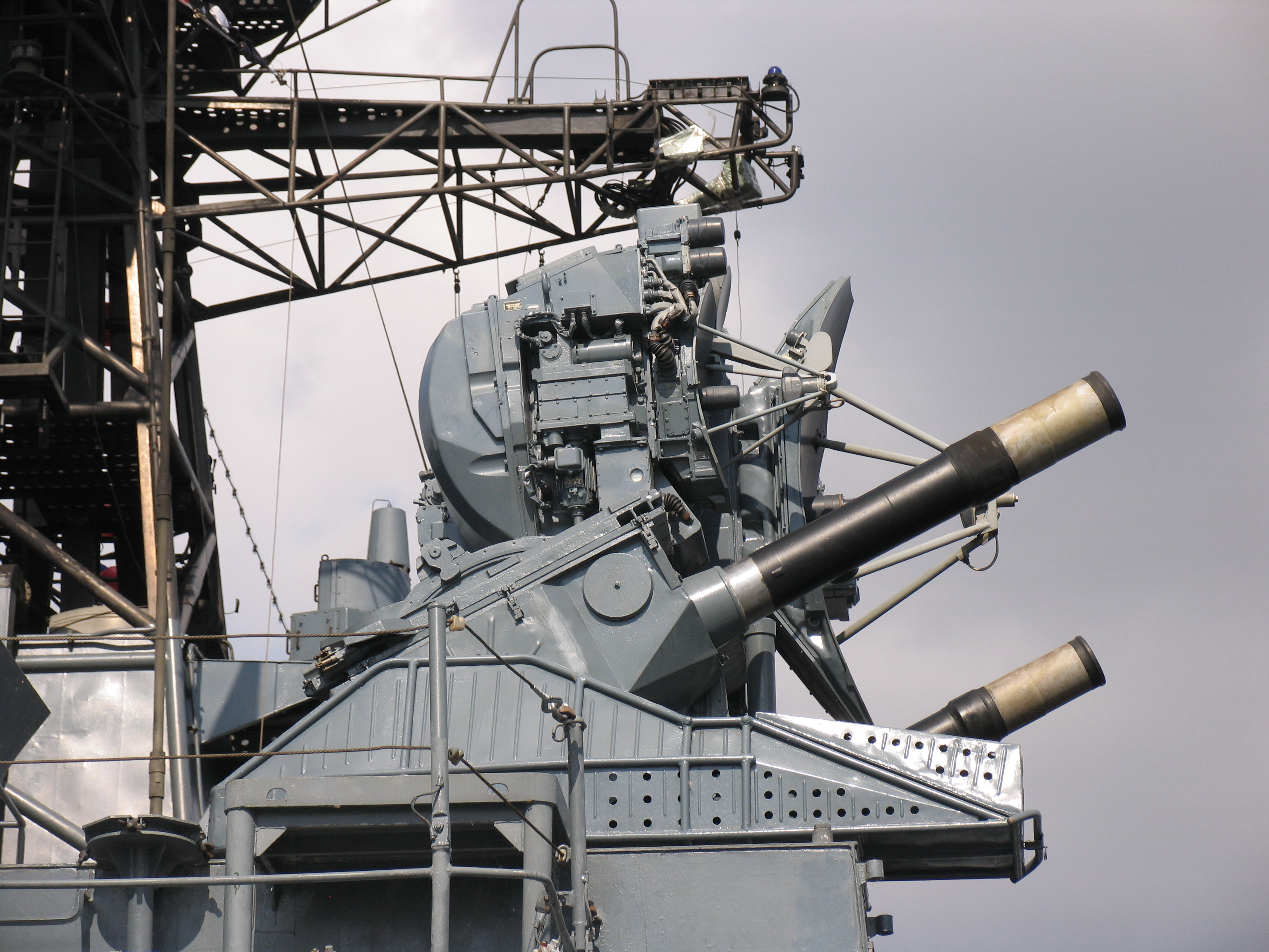 ЗРАК «Кортик» на СКР "Ярослав Мудрый"